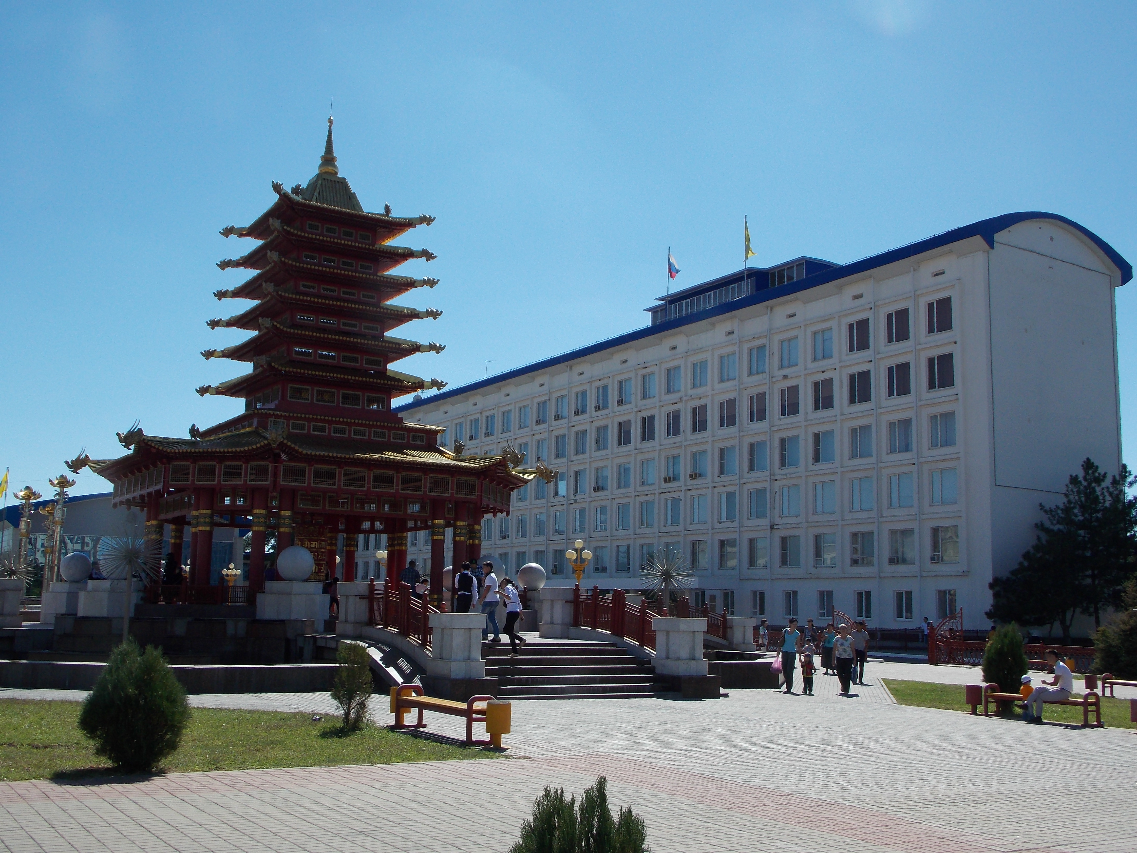 Площадь Ленина, Элиста, Калмыкия